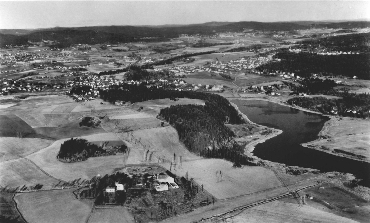 Østensjøvannet med omgivelser, 1948